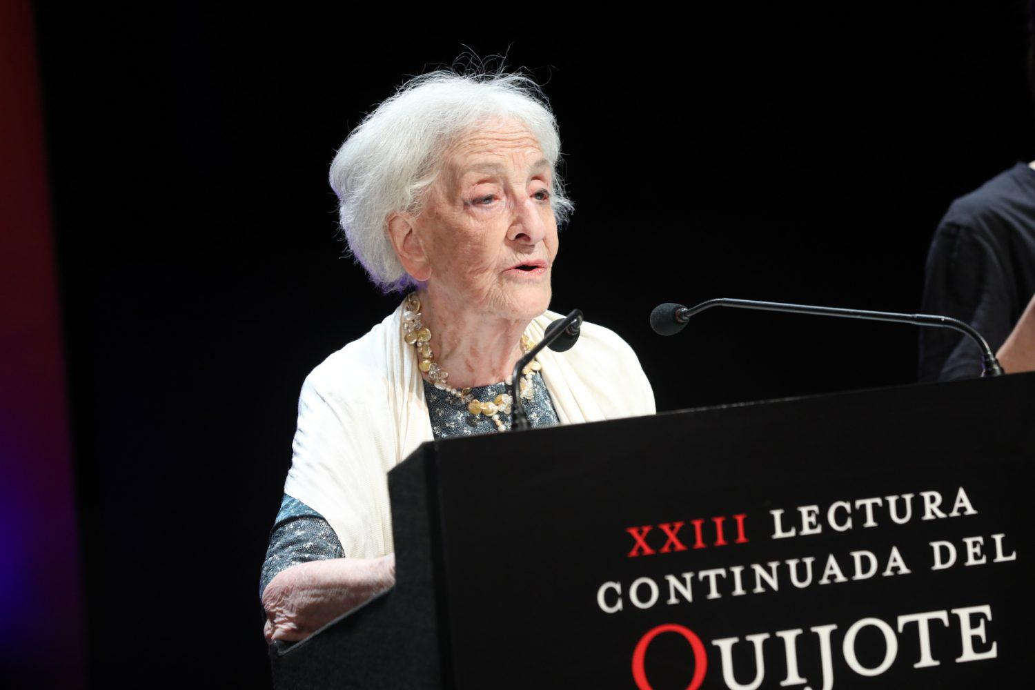 La alcaldesa de Madrid, Manuela Carmena, ha participado esta tarde en la lectura continuada de ‘El Quijote’ que se celebra todos los años para conmemorar el Día Internacional del Libro. La escritora uruguaya Ida Vitale, Premio Cervantes 2018, ha sido la encargada de iniciar la lectura y le han sucedido el presidente en funciones de la Comunidad de Madrid, Pedro Rollán, el ministro de Cultura, José Guirao, y la propia alcaldesa.